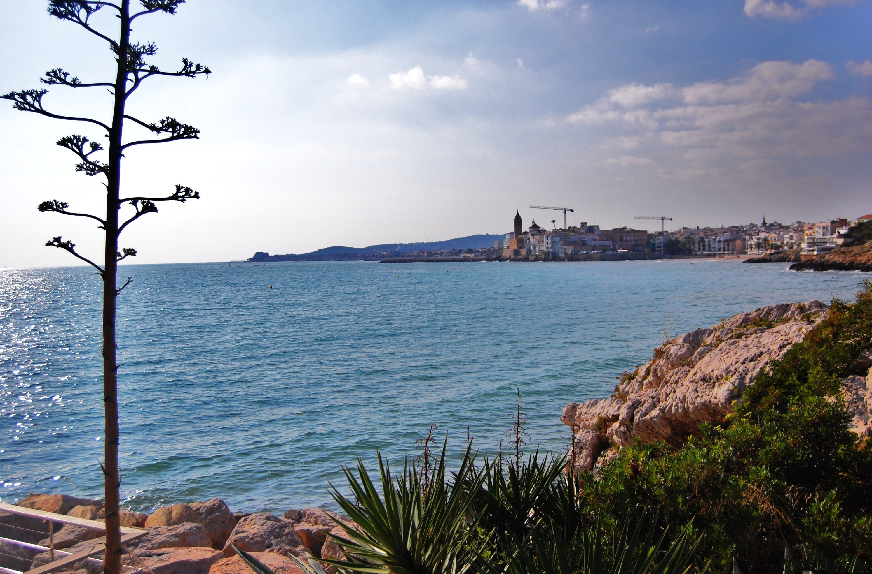 Sitges a la tardor